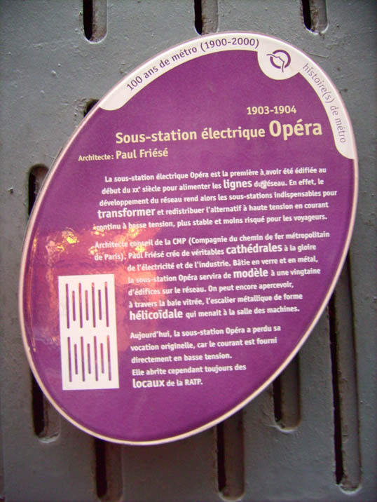 Panneau RATP décrivant la sous-station d'alimentation électrique Opéra du métro de Paris